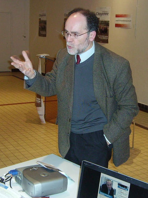 Gérard Sebaoun lors d'une réunion publique à Franconville pendant la campagne de l'élection municipale de 2008.